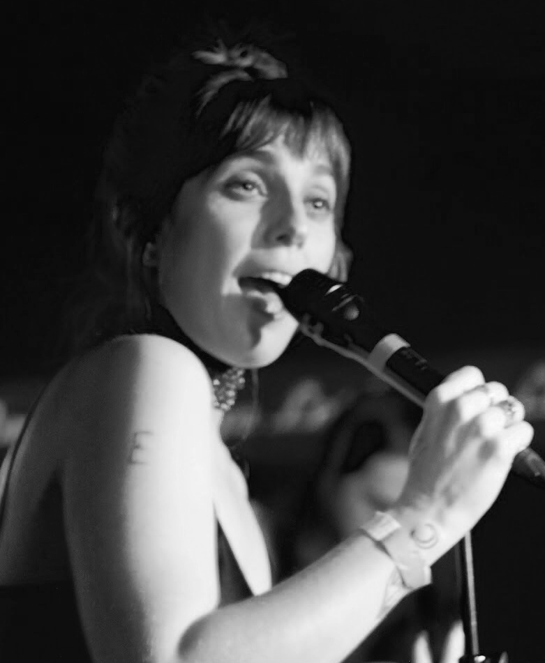 U.S. Girls ::: Larimer Lounge ::: 03.21.18